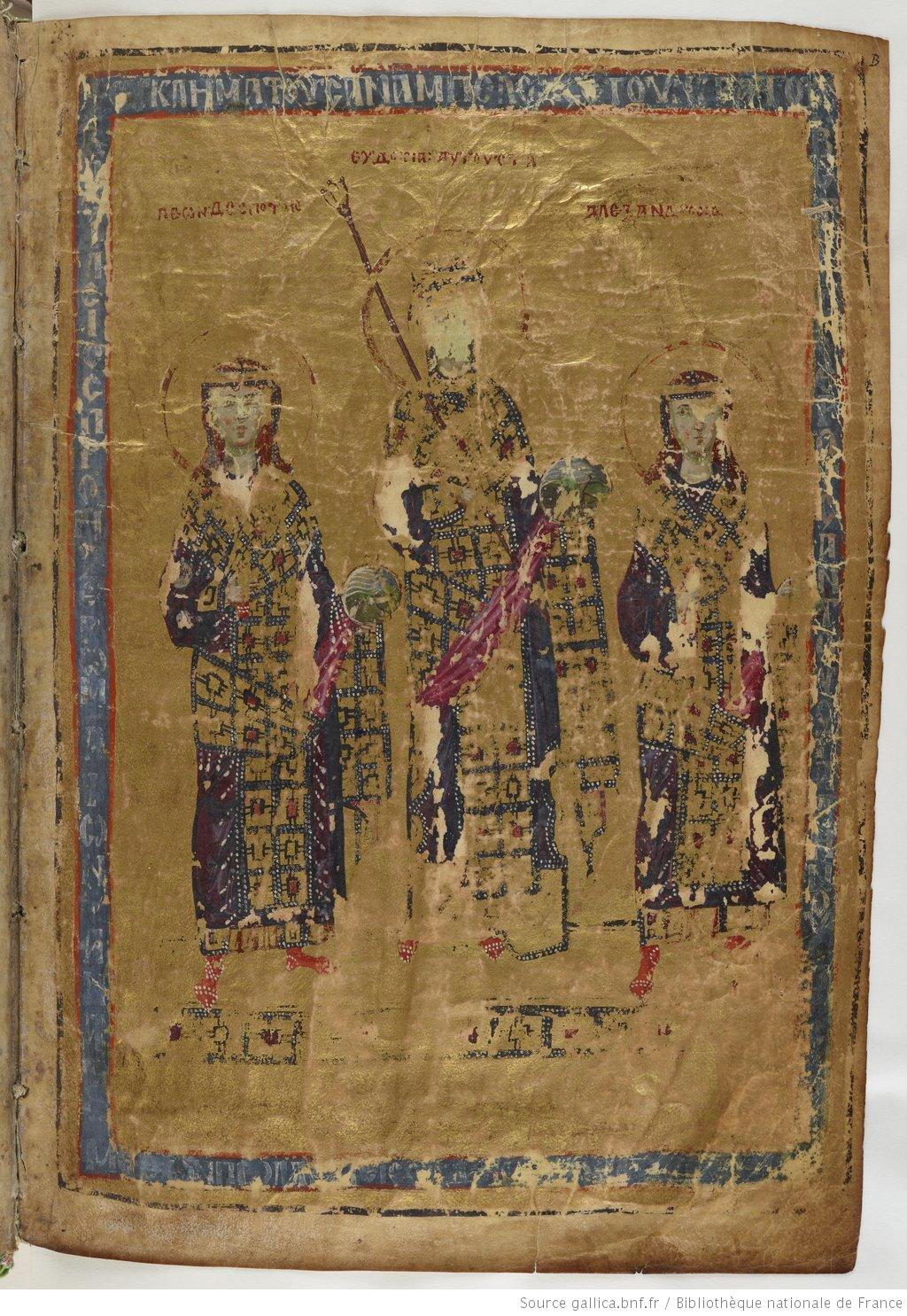 Гомилии Григория Богослова gr. 510, f 11